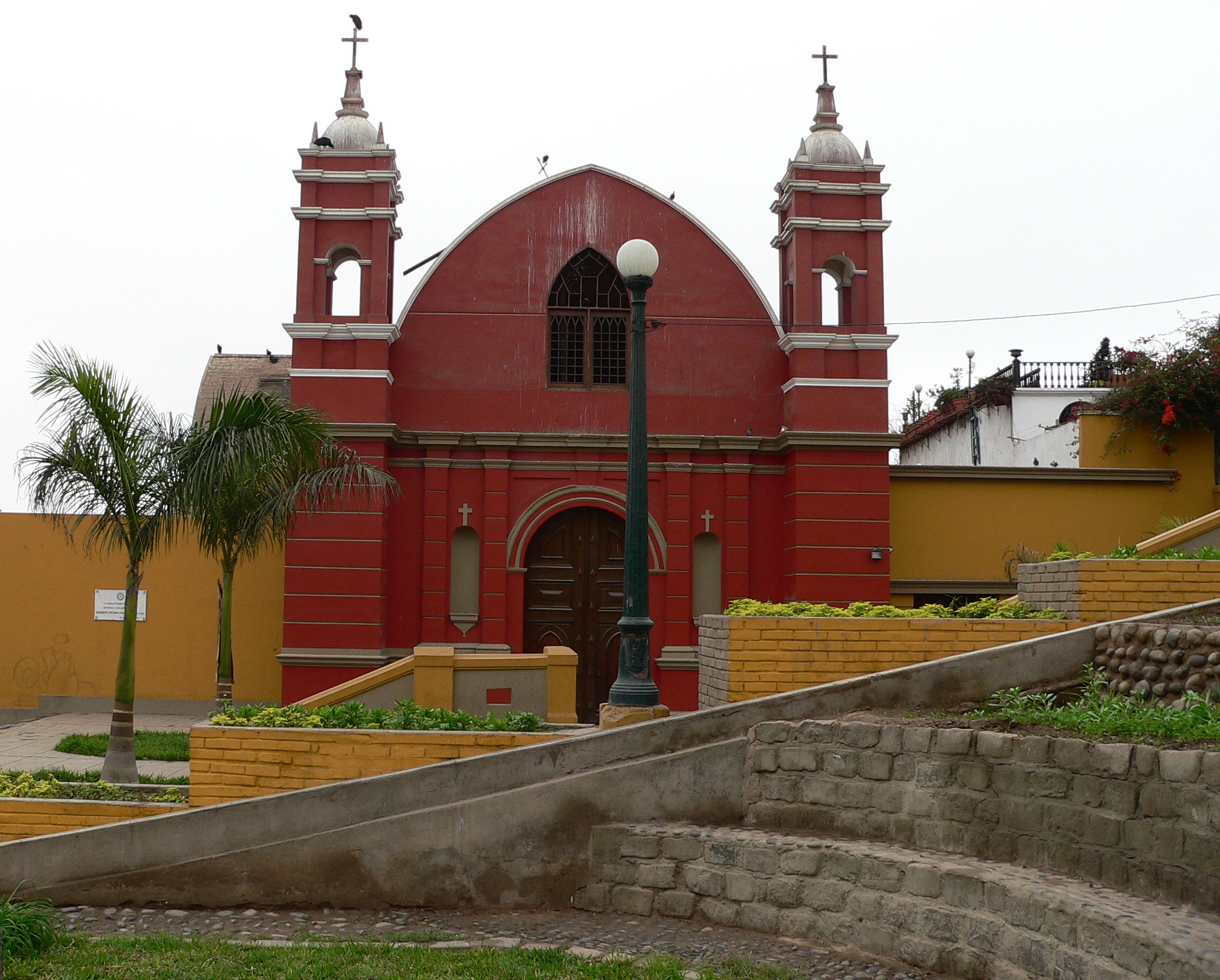 Ermita de Barranco Descripción: Ermita de Barranco Lugar: Distrito de Barranco Ciudad : Lima Fotógrafo: © Manuel González Olaechea y Franco Fecha de la foto : 12 de julio de 2007